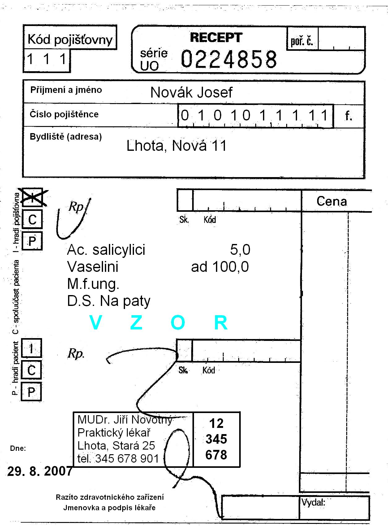 Vzor lékařského předpisu ČR (smyšlené osobní údaje)